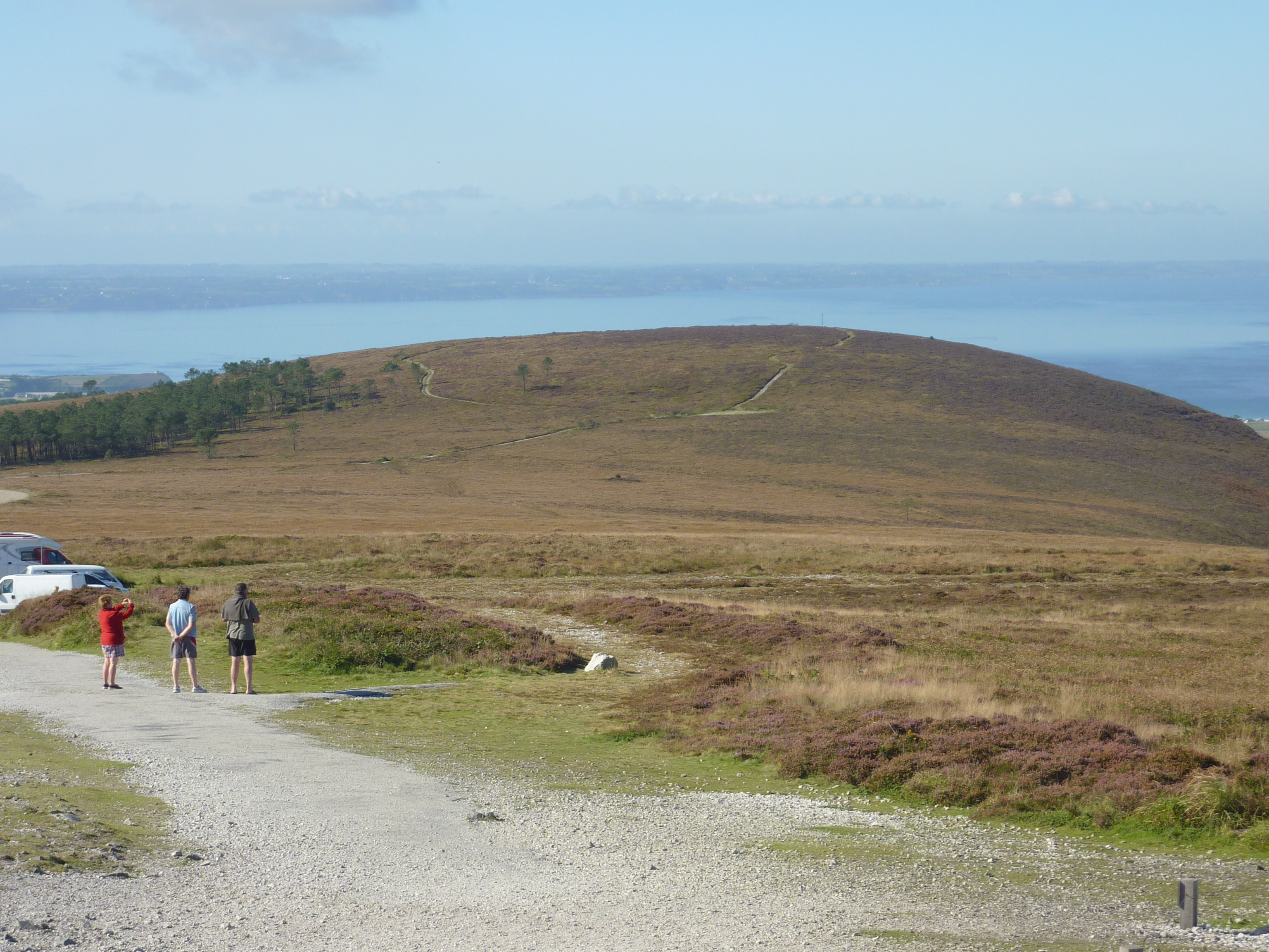 Le sommet secondaire du Menez-Hom vu dus sommet principal (les arbres ont poussé sur le versant est, en site d'abri)